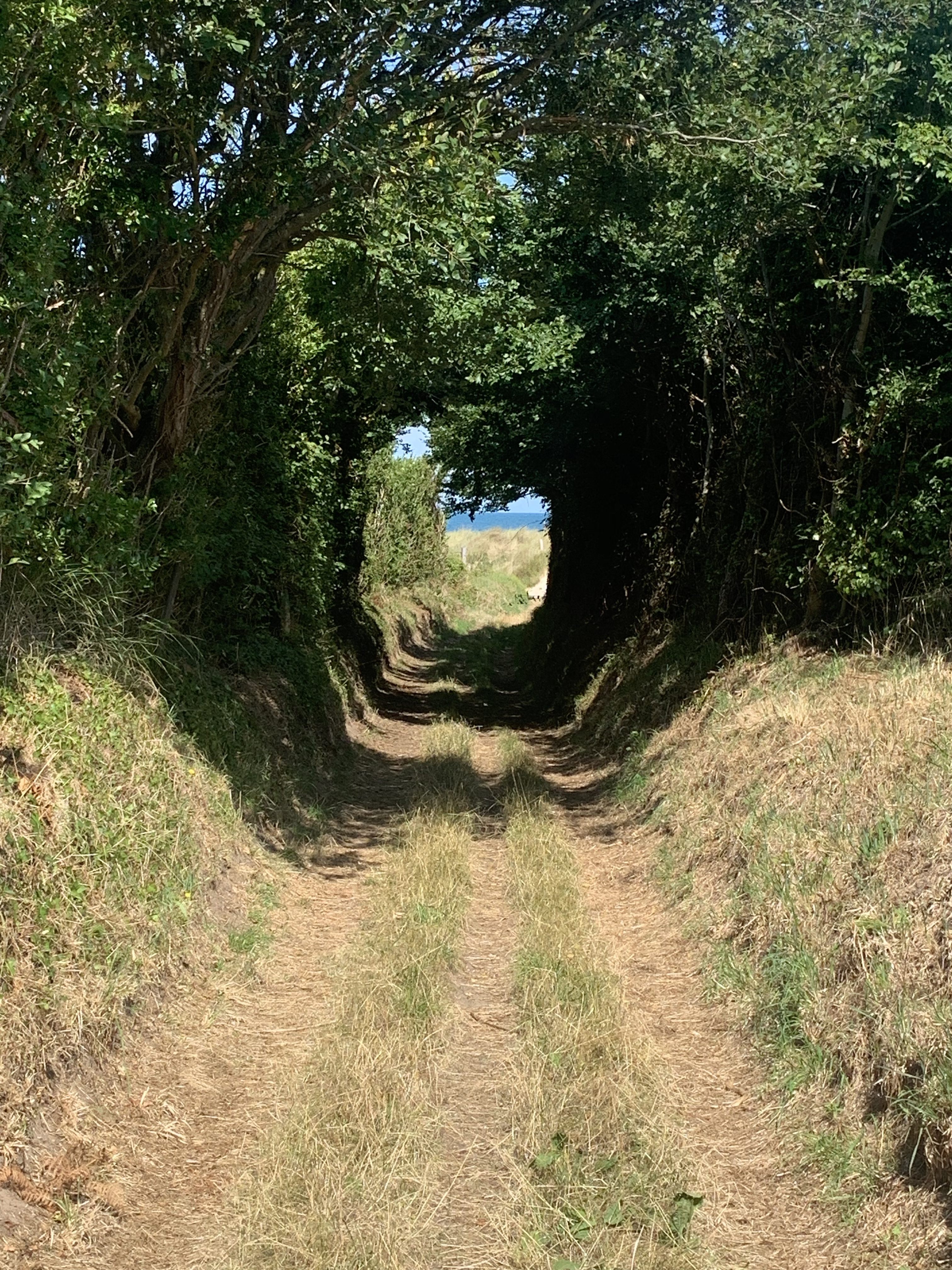 Chemin du Poult - Fermanville, Normandie